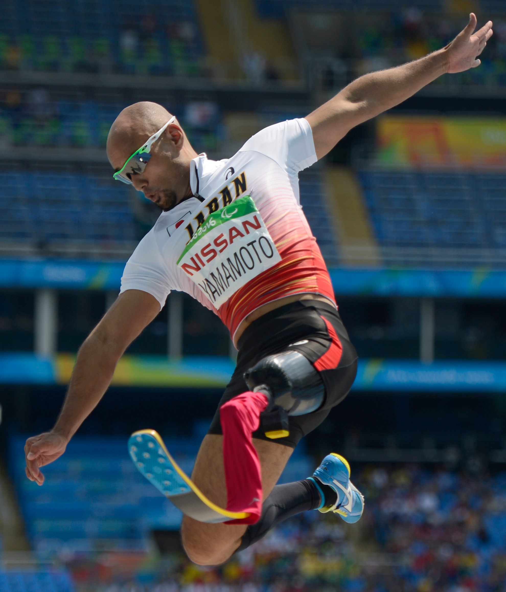 Rio de Janeiro - Atsushi Yamamoto do Japão leva prata no salto em distância T42 masculino nos Jogos Paralímpicos Rio 2016 (Fernando Frazão/Agência Brasil)